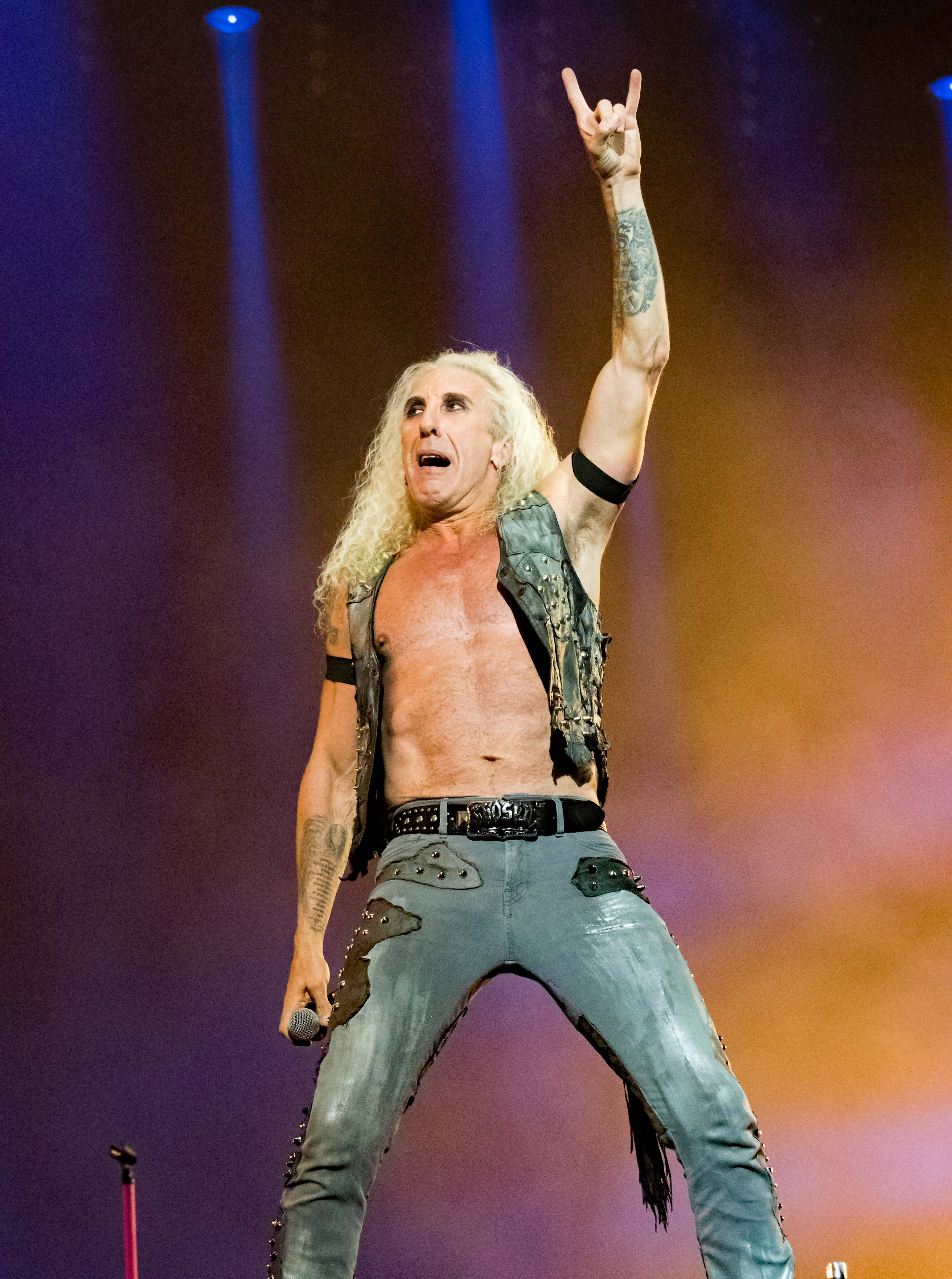 Twisted Sister beim Wacken Open Air 2016